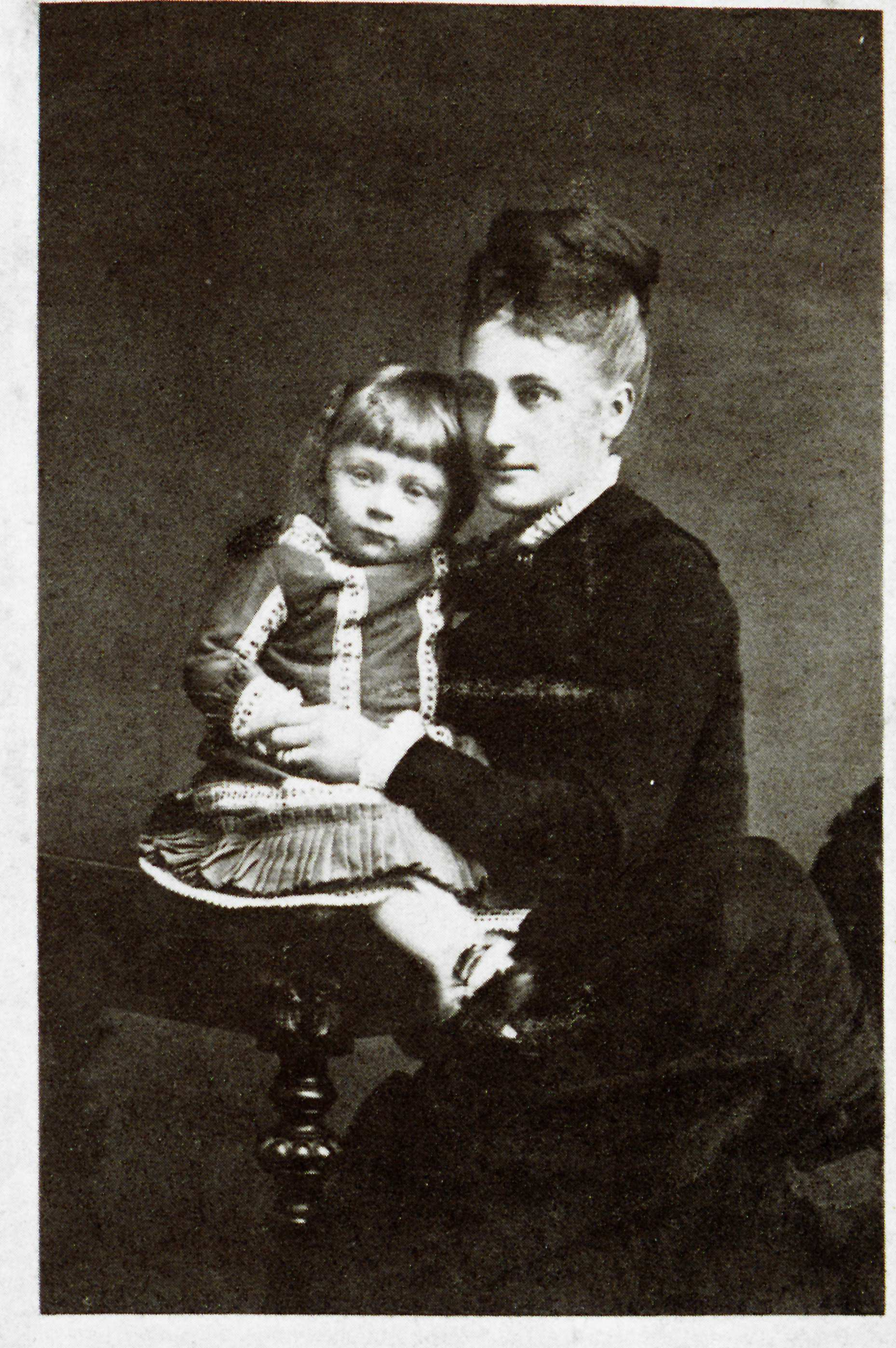 Aloisia von Orlando und Sohn Fritz von Herzmanovsky-Orlando 1880. Fotografie von Josef Löwy